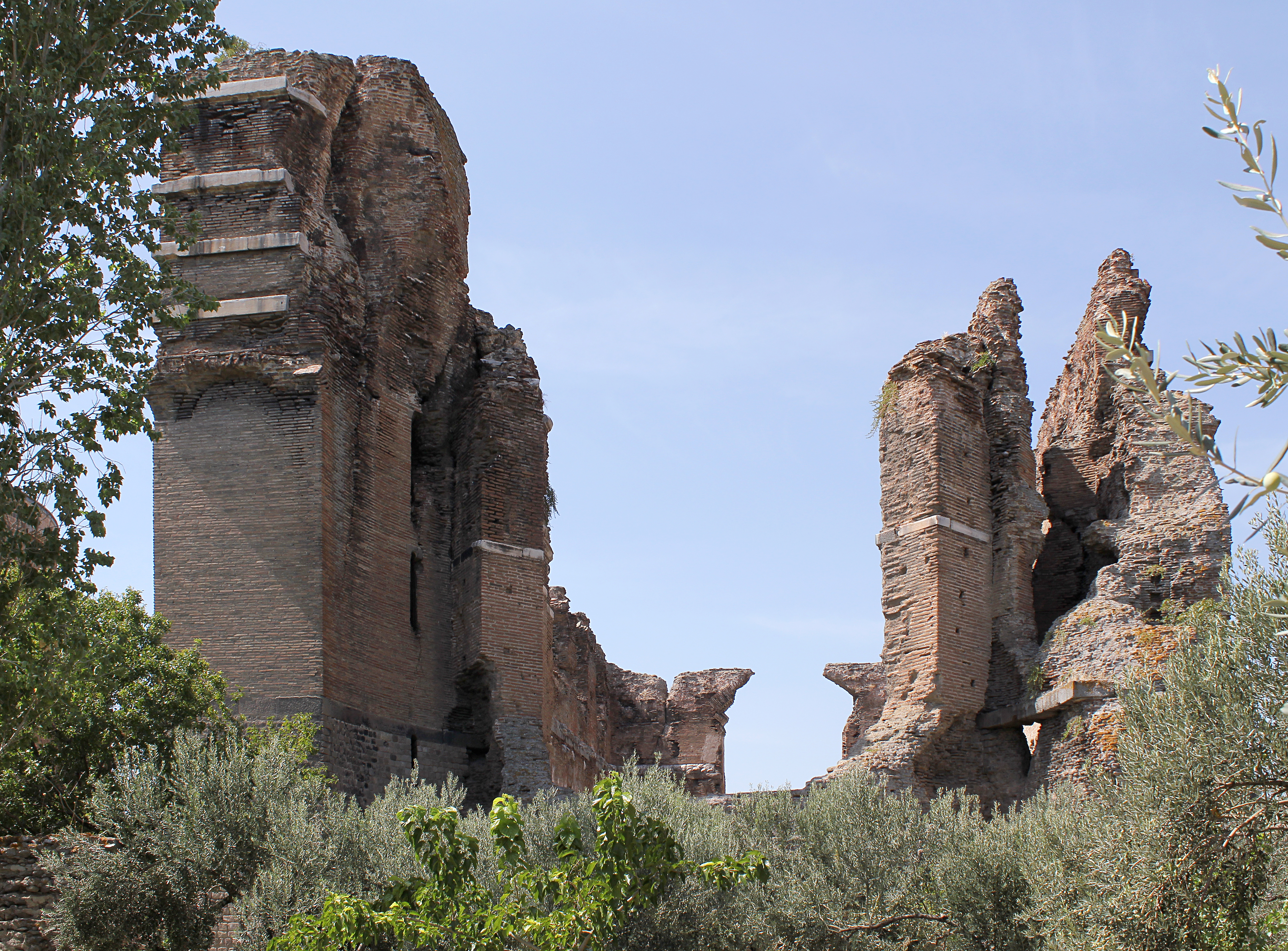 Rote Halle, Pergamon, Westtürkei, Blick von Osten mit nachträglich eingebauter Apsis